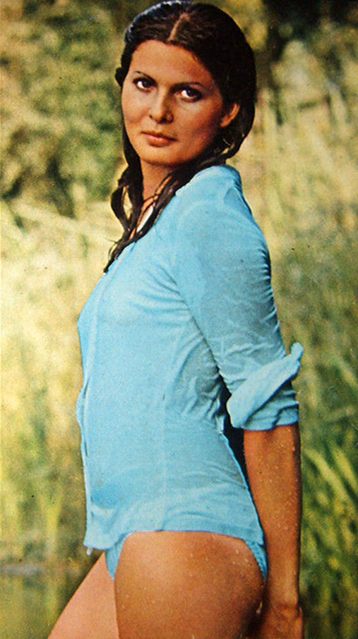 L'attrice italiana Simonetta Stefanelli, 1972 circa.